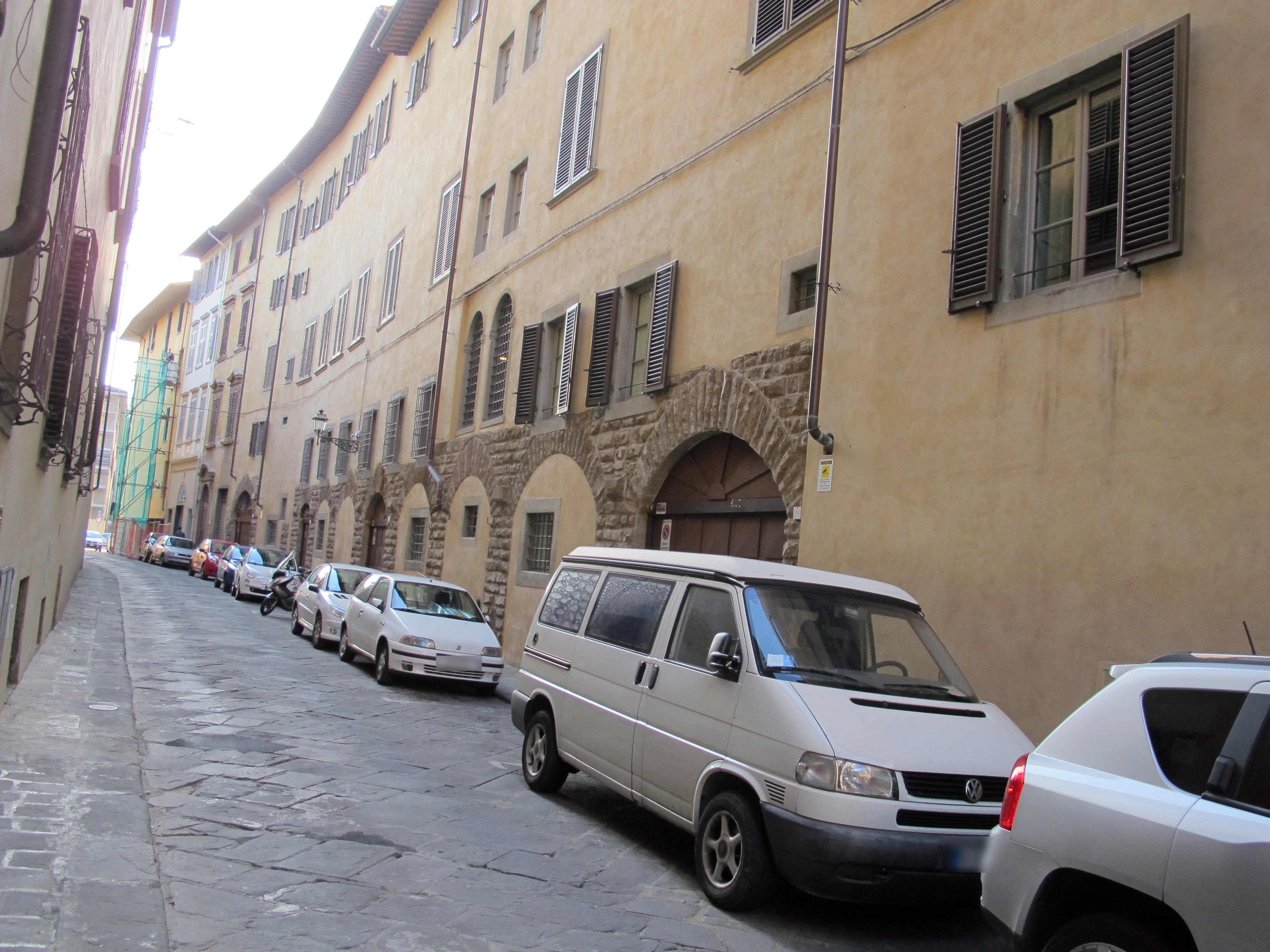 Palazzo bardi serzelli, lato su via malenchini